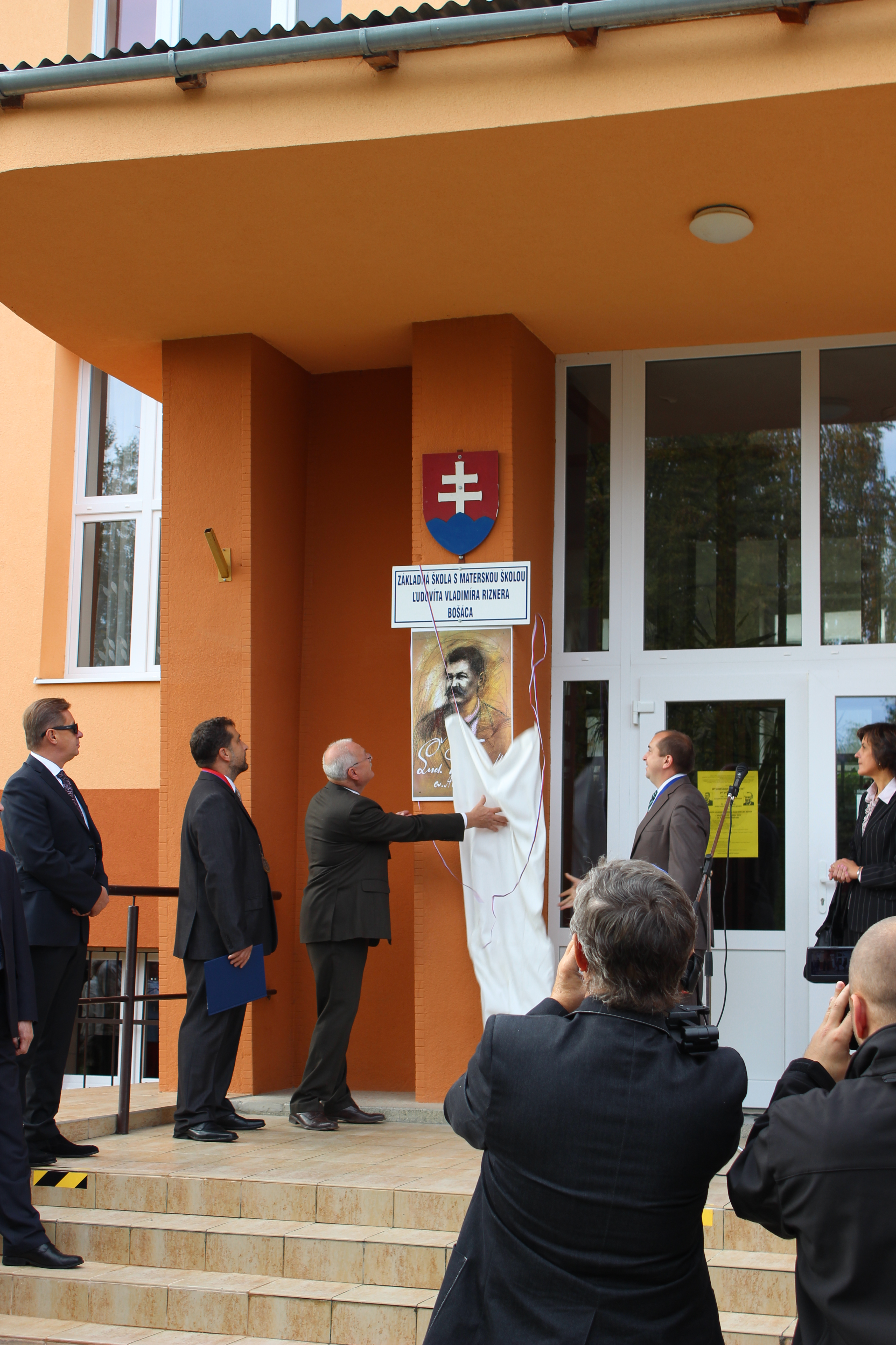 Slovenský prezident Ivan Gašparovič odhaluje Riznerovu pamětní desku na místní škole v Bošáci při zahájení Riznerových a Holubyho oslav v Bošáci.